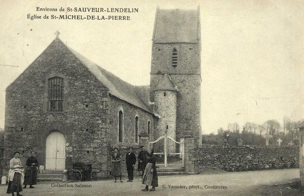 Saint-Michel-de-la-Pierre - Eglise Saint Michel - Carte postale